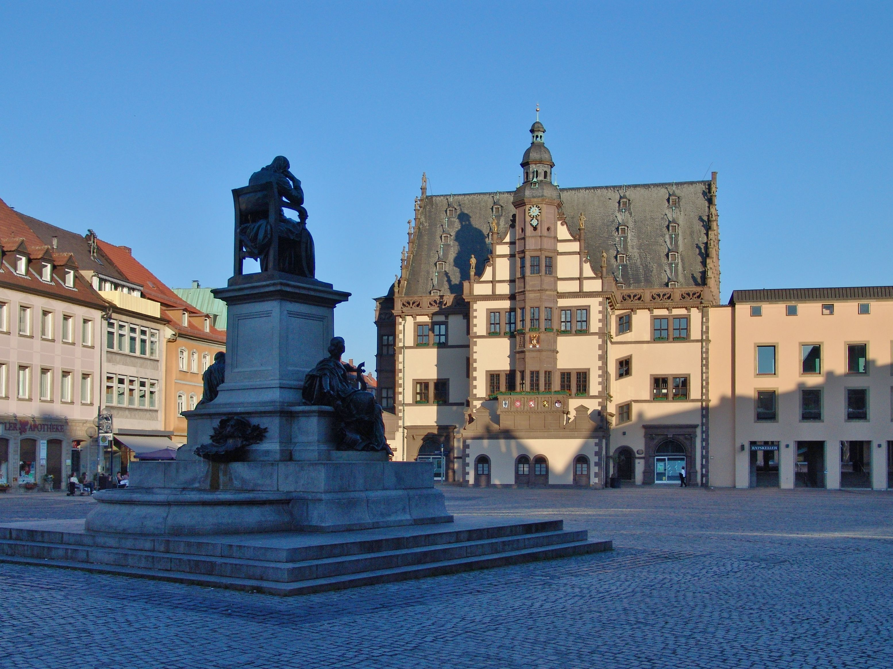 Schweinfurt - Rückertdenkmal und Rathaus